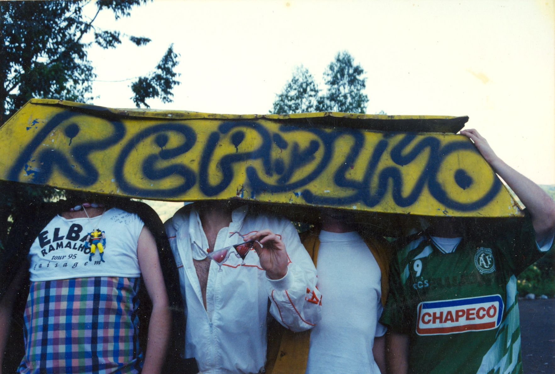 demo-tape Campo e Lavorá